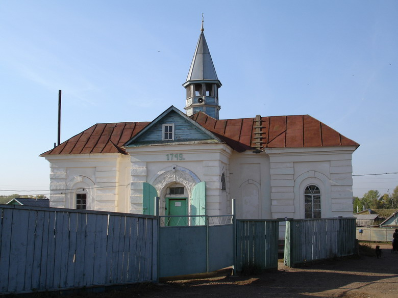 «Двухминаретная мечеть» (тат. Кушманаралы мәчет) в с. Татарская Каргала, Оренбургская область, Россия